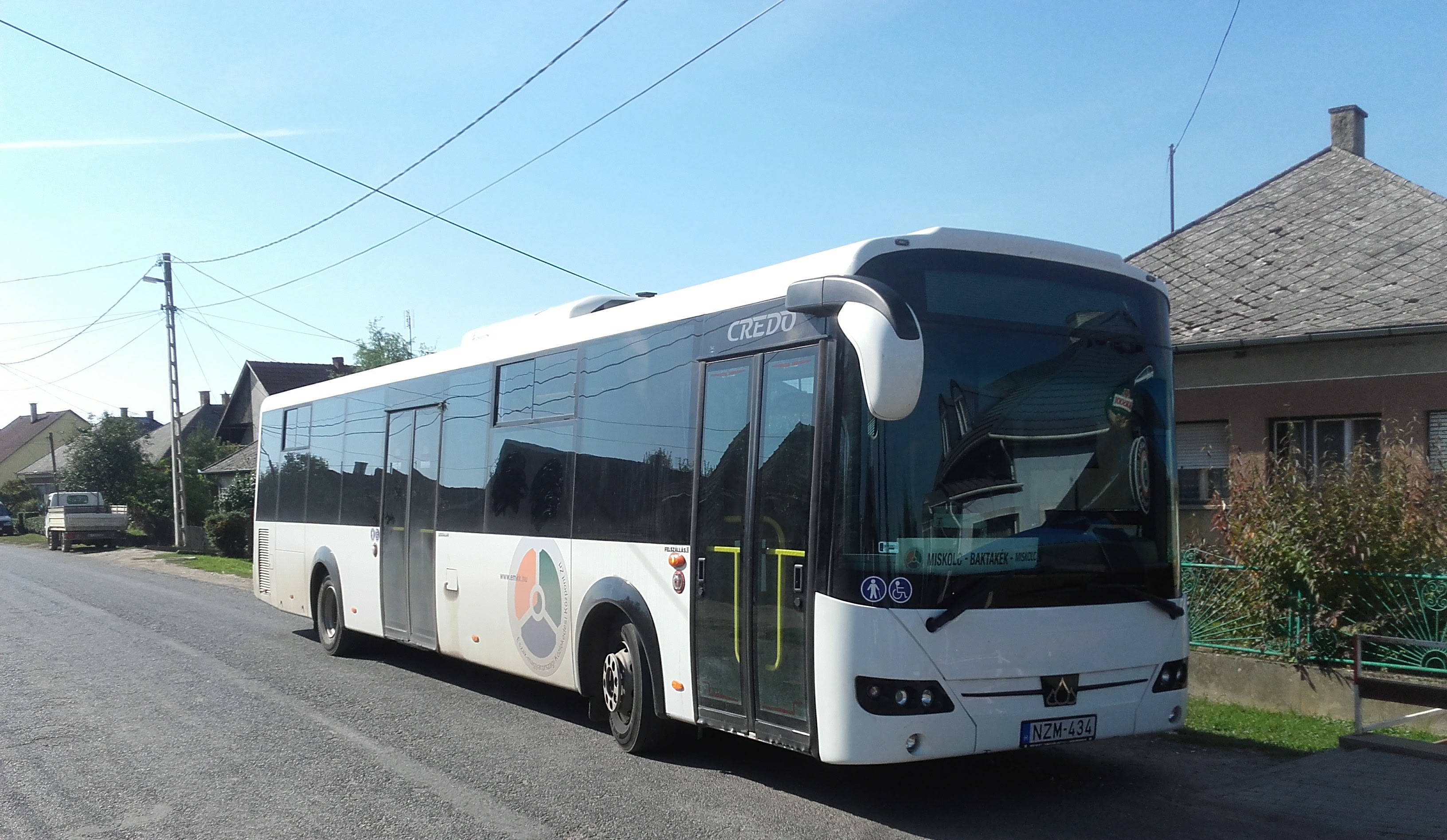 Az ÉMKK NZM-434 rendszámú Credo Econell 12 típusú busza Baktakéken, a 3716-os helyközi járaton.